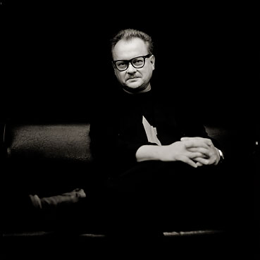 Heinz Rudolf Kunze Bildproduktion für das Musikmagazin "Melodie und Rhythmus"